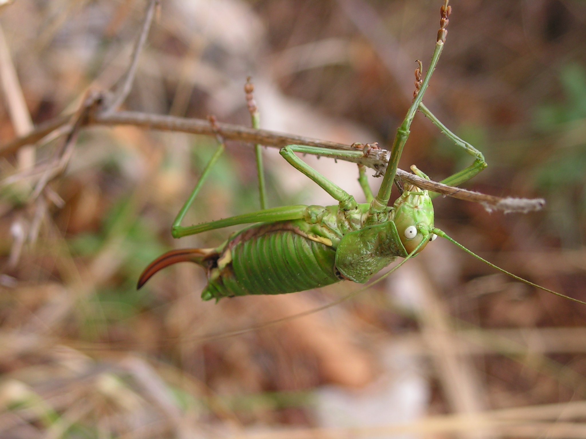 Weibliche Steppen-Sattelschrecke (Ephippiger ephippiger). Aufgenommen an der Costa Brava in Spanien ca. 100 m vom Sandstrand entfernt. Am Hinterleib erkennt man den Legebohrer.